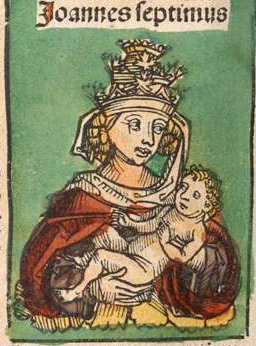 Joannes_sepimus. In: / Wolgemut, Michael / Pleydenwurff, Wilhelm: Liber chronicarum, Nürnberg, 1493. [BSB-Ink S-195GW M40784]